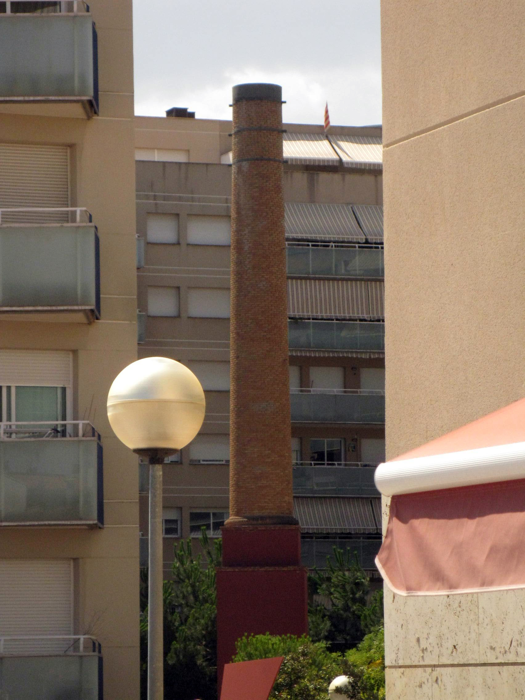 Vapor Galí (Terrassa), en terrenys del qual s'han construït uns blocs de pisos. De l'antic vapor només en queda la xemeneia, al pati interior dels nous edificis d'habitatges.